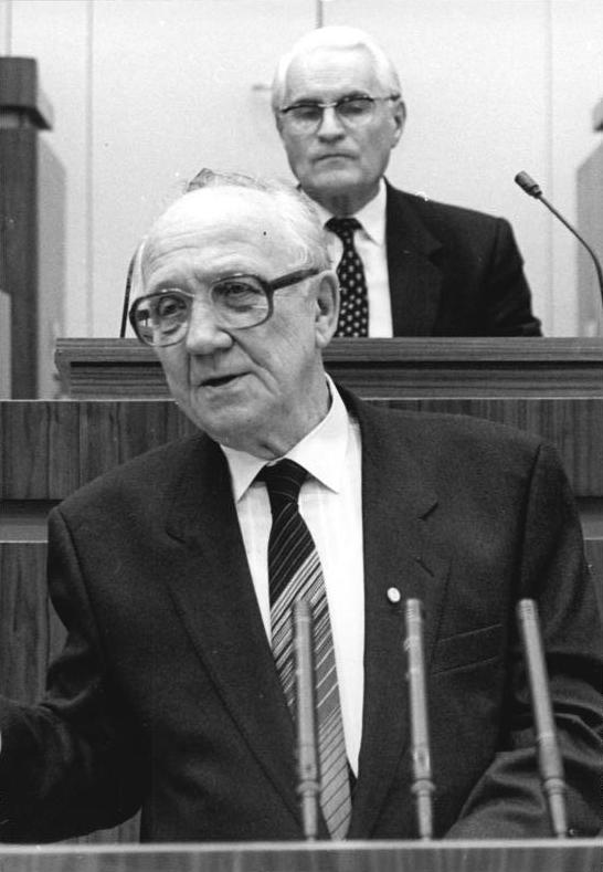 ADN-ZB/Oberst 8.11.1988 Berlin: Sondersitzung der Volkskammer Während der Sondersitzung der Volkskammer aus Anlaß des 50. Jahrestages der faschistischen Pogromnacht hielt Volkskammerpräsident Horst Sindermann eine Gedenkrede.